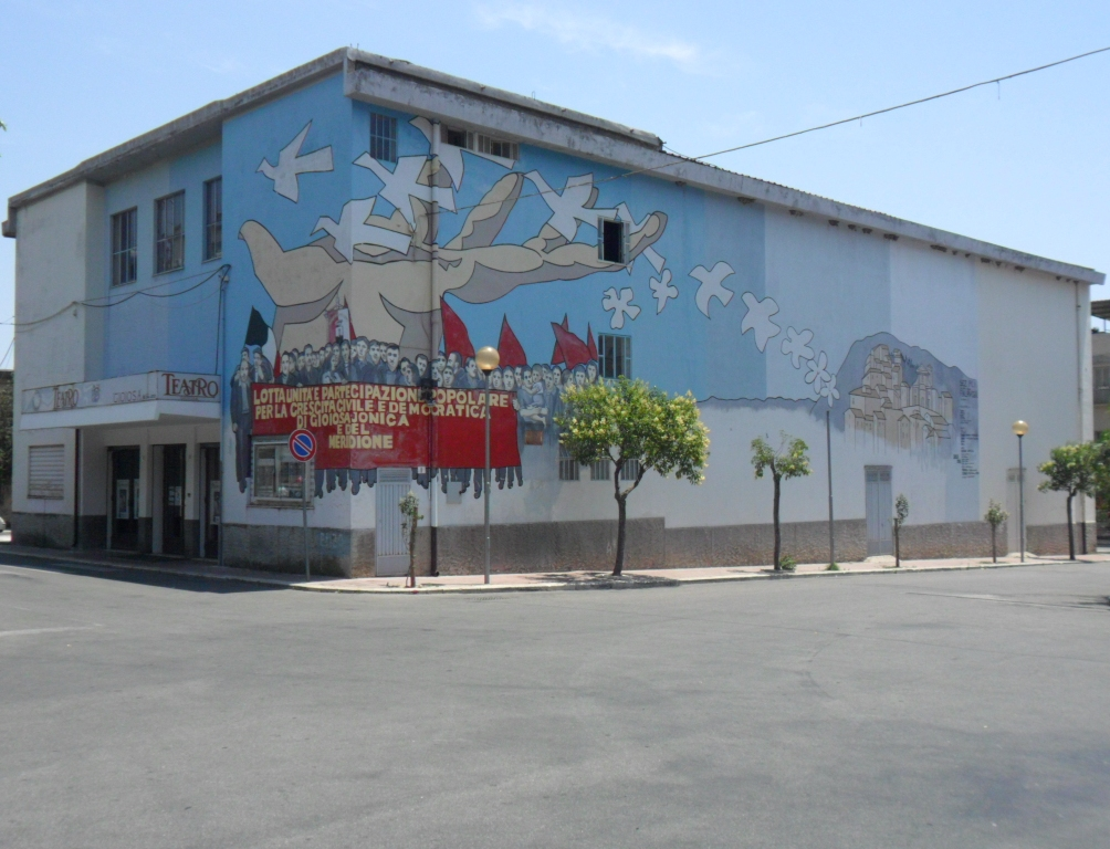 Gioiosa Jonica Teatro Gioiosa